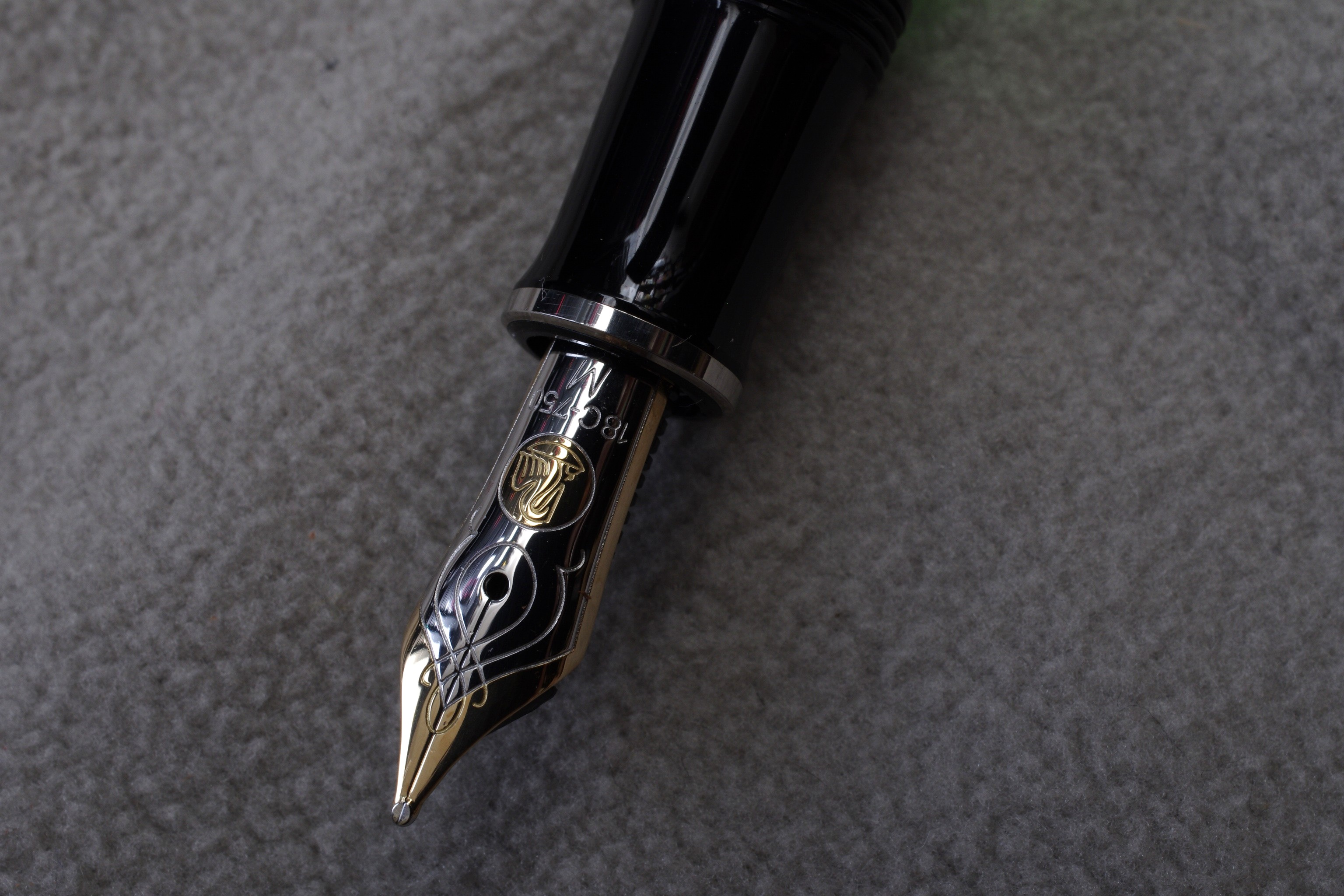 pelikan トレドM710 ペン先